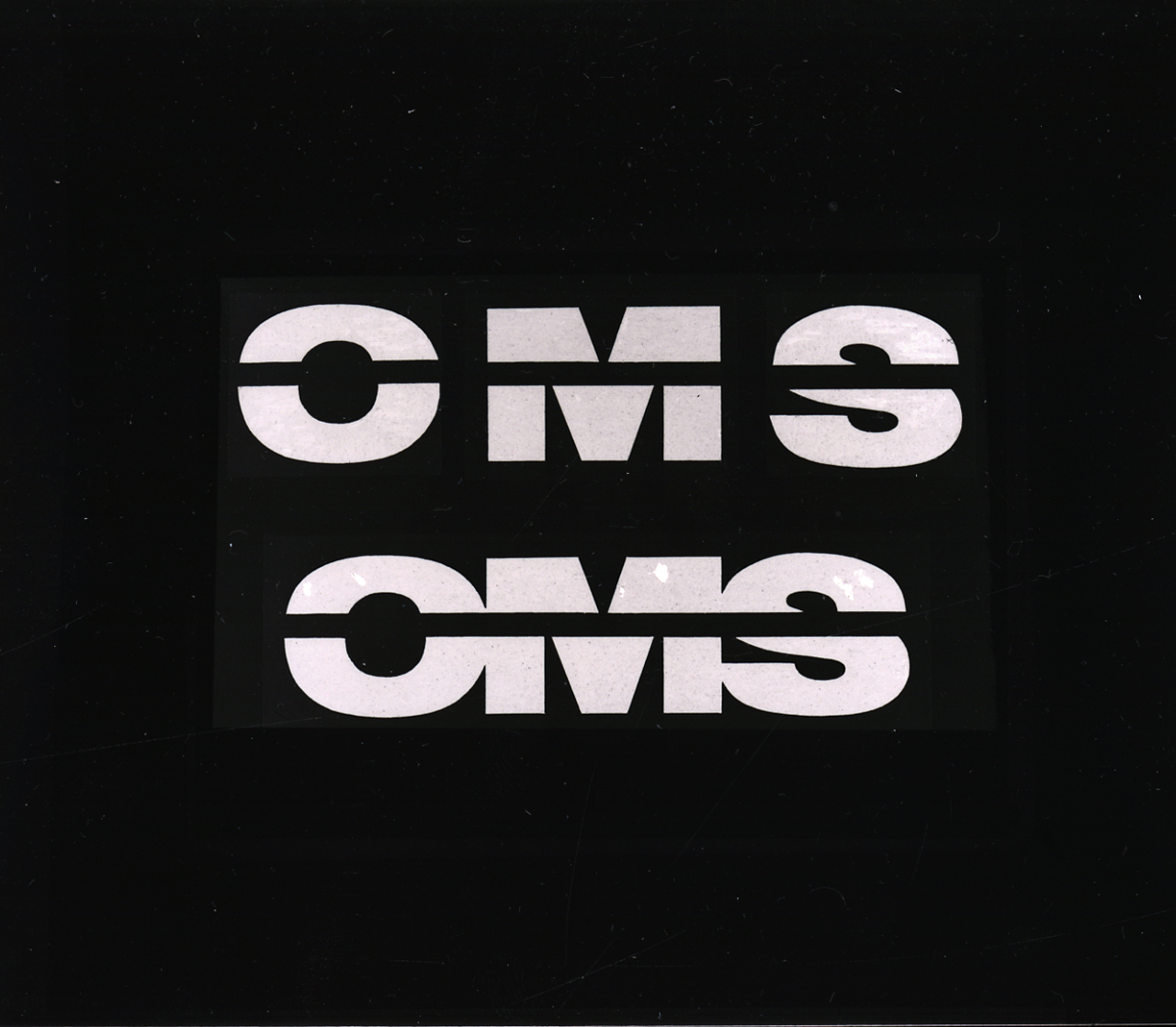 Servizio fotografico : Padova, 1968 / Paolo Monti. - Buste: 3, Fototipi: 3 : Negativo b/n, gelatina bromuro d'argento/ pellicola ; 10x12. - ((Serie costituita da 3 buste sciolte di negativi identificati con i nn.: 14193, 14194, 14194bis. - La busta identificata con il n. 14193 contiene una diapositiva b/n. - Occasione: Documentazione per pubblicità. - Fonte: Agenda di Paolo Monti: Monti/ 3 aprile 1966 - 9 marzo 1971/ 12421-16823 (1966-1971), presso Archivio Paolo Monti. - Fonte: Fattura di Paolo Monti: IV. Commesse/ Fattura/ Fotografie per pubblicità autobus snodabile (1968/06/25). Ordinazione del Signor Ing. Villa. Fotografie esguite a Padova